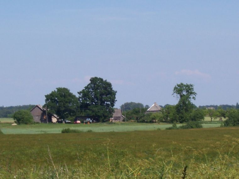 Photo des alentours de Penkule prise durant l'été 2005.